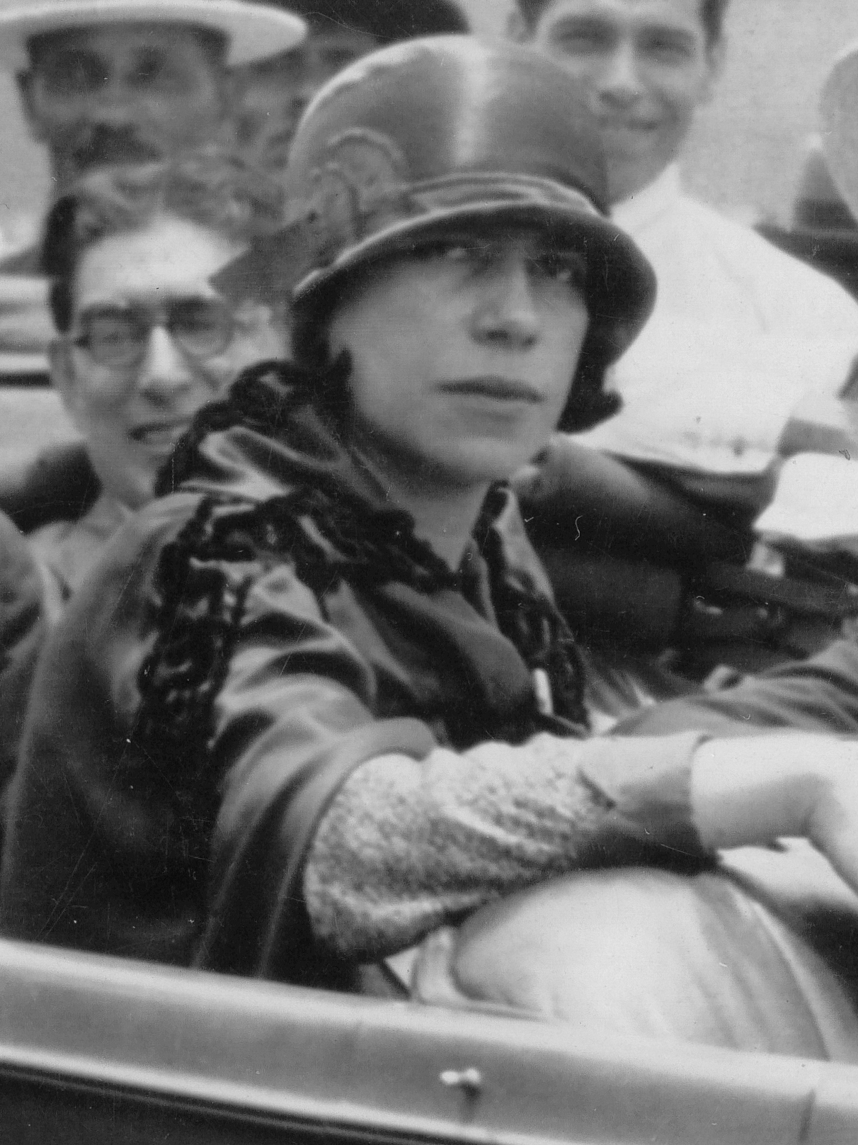 Ángela Ramos Relayze en 1929.